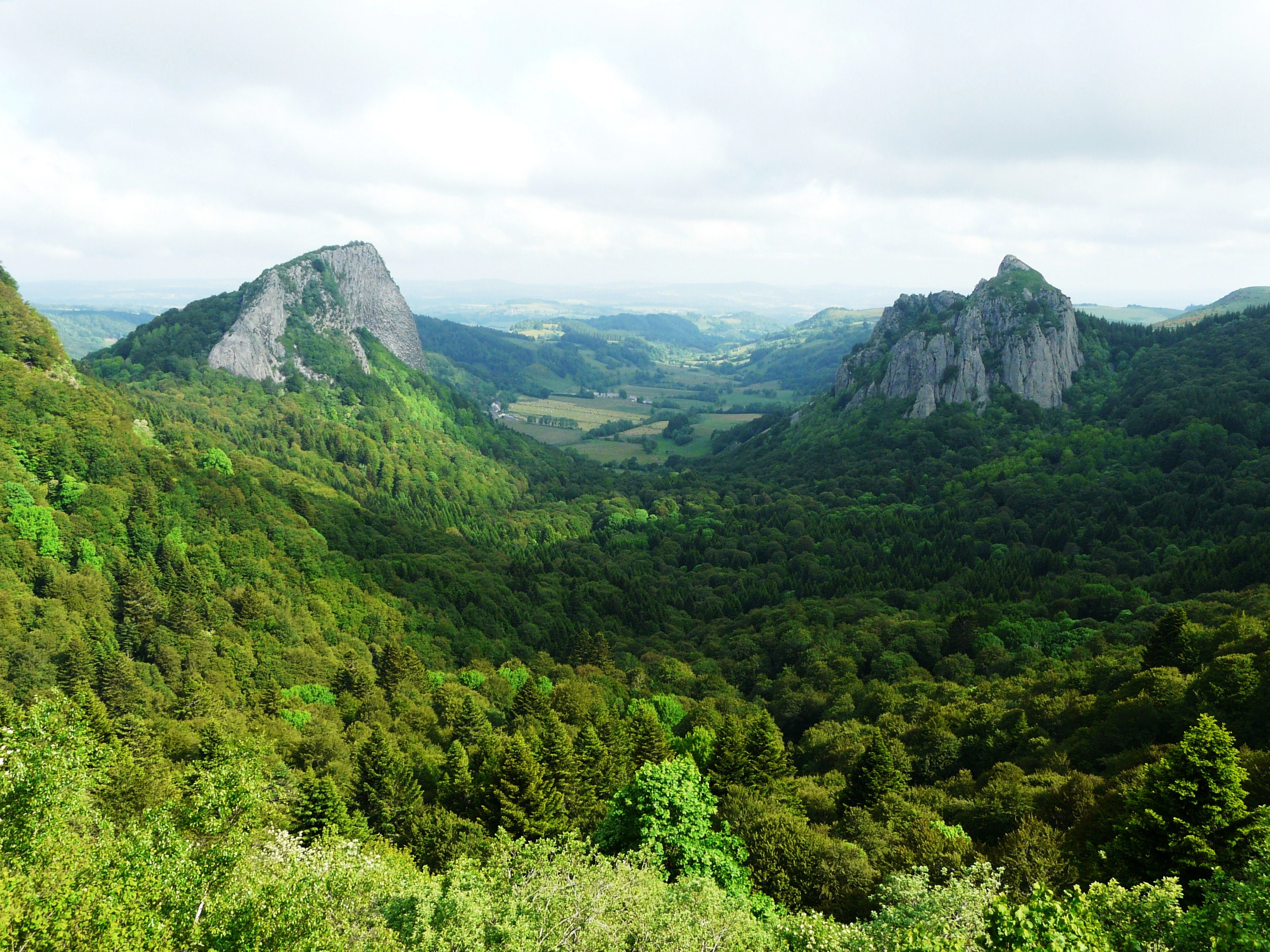 Les roches Tuilière (à gauche, commune de Rochefort-Montagne) et Sanadoire (à droite, commune d'Orcival), Puy-de-Dôme, France.